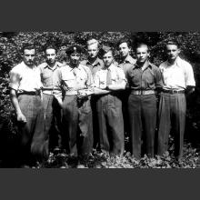 Powojenny Maczków